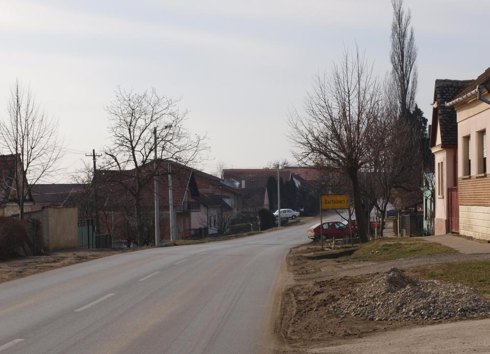 Ulaz u selo Bartolovci, Brodsko-posavska županija.